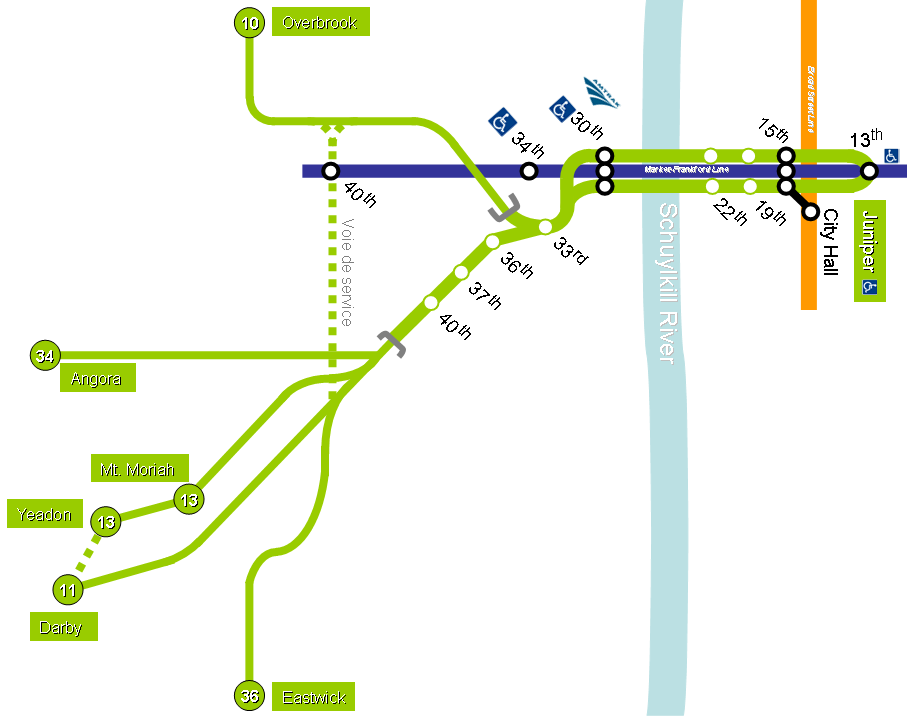 Plan de la SSL